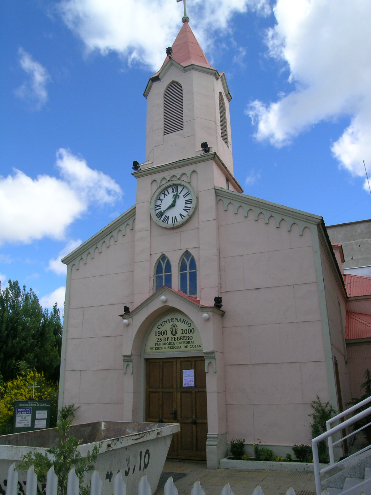 Catedral de Nuestra Señora de Luján